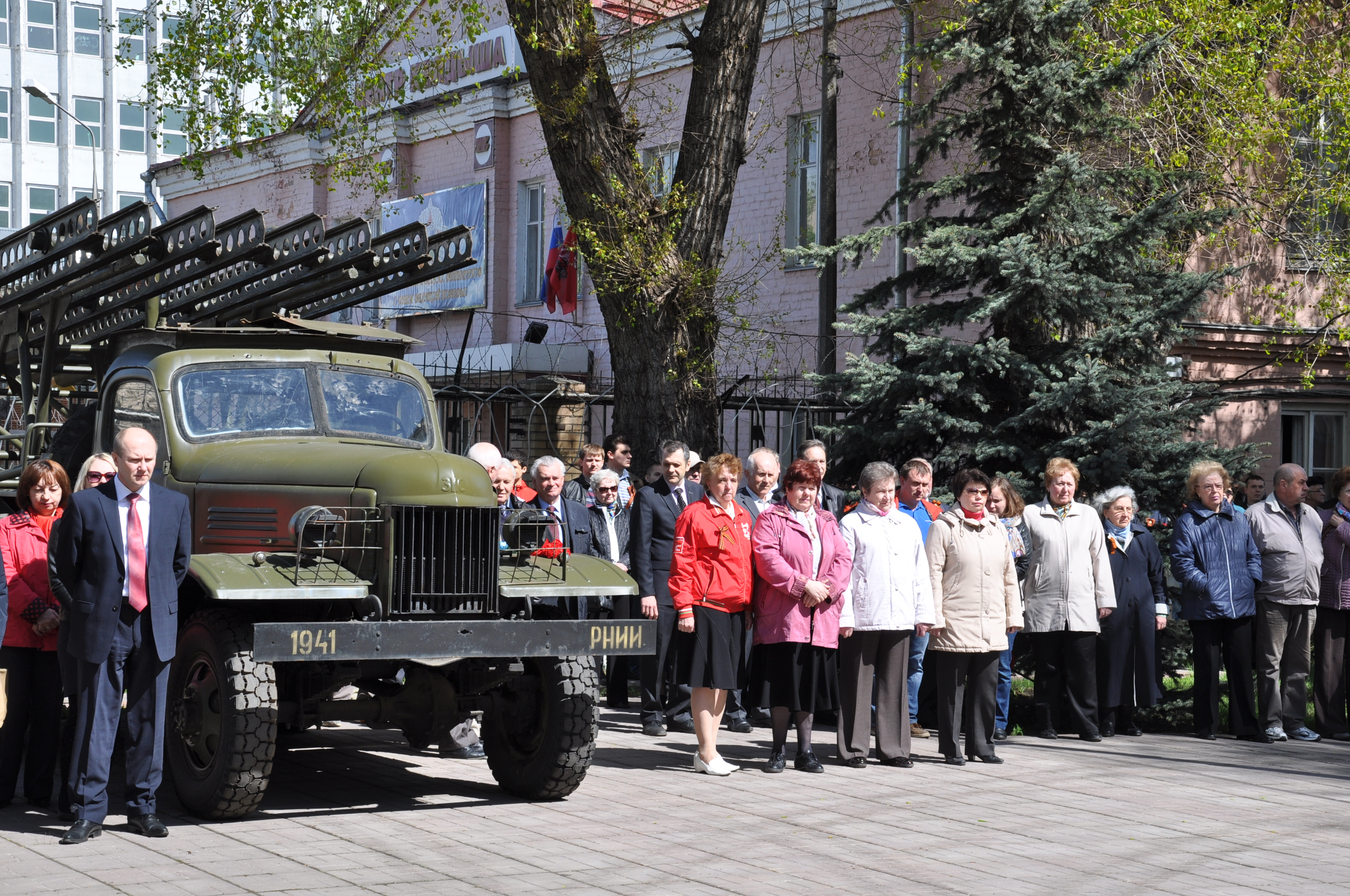 БМ-13